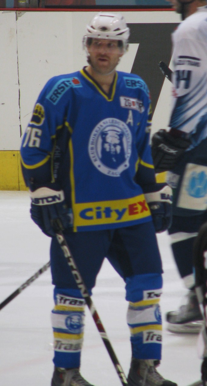 Aaron Fox